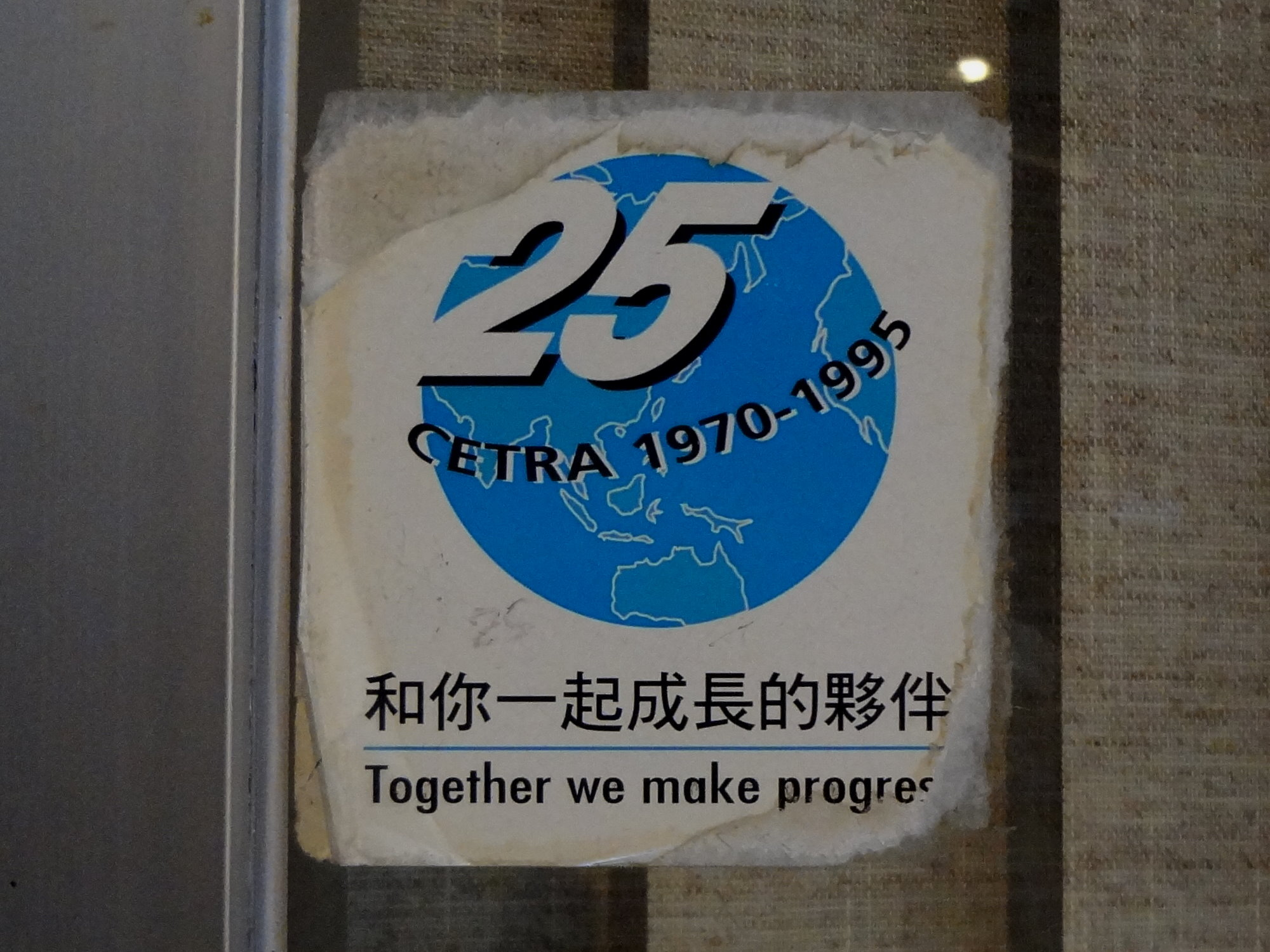 1995年中華民國對外貿易發展協會25週年貼紙，貼於台北世界貿易中心展覽大樓1樓外貿協會出納室玻璃窗上。